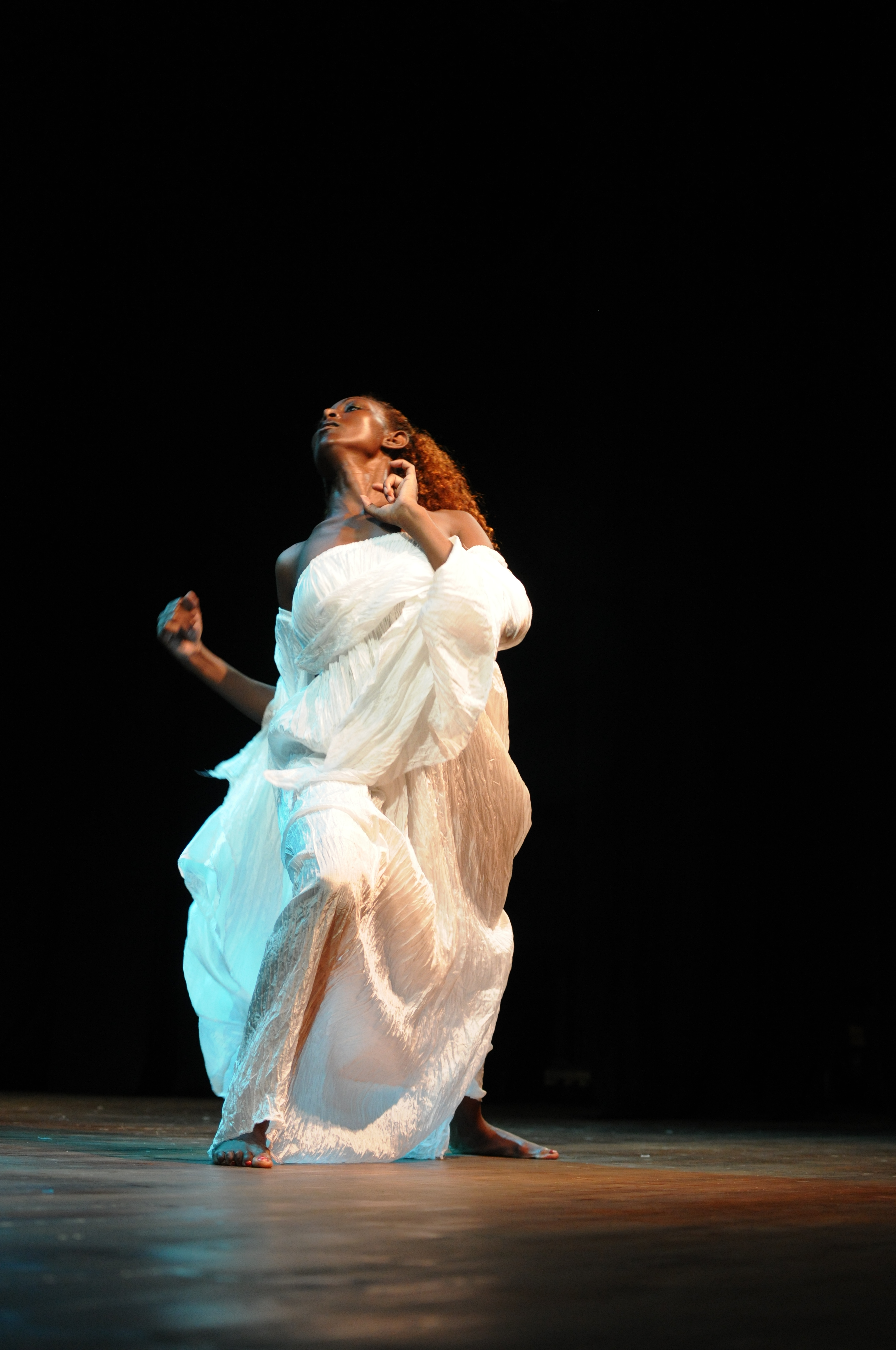 רות אשל היא רקדנית, חוקרת מחול, כוריאוגרפית ומבקרת מחול . נפאס , כוריאוגרפיה - רות אשל, רקדנית - מינאלו דגיה, צילום - עופר זבולון